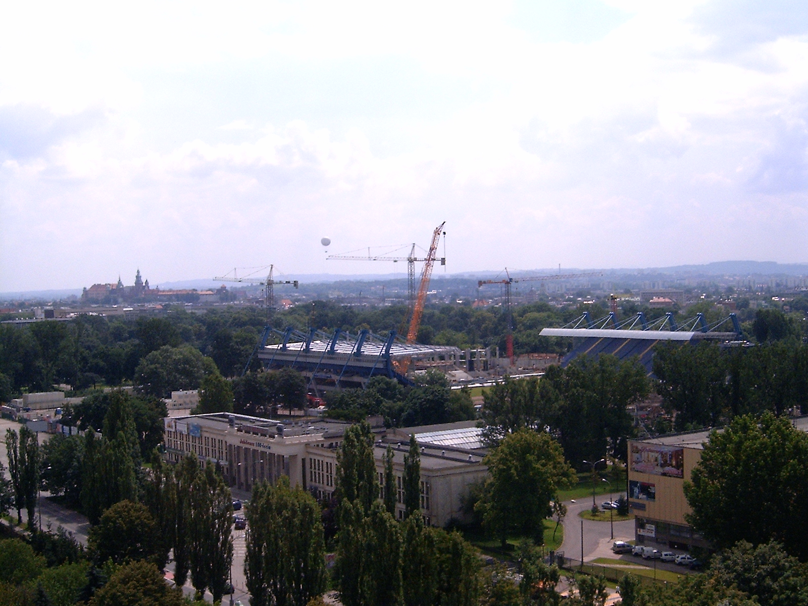 Wisła Kraków Stadion Rozbudowa